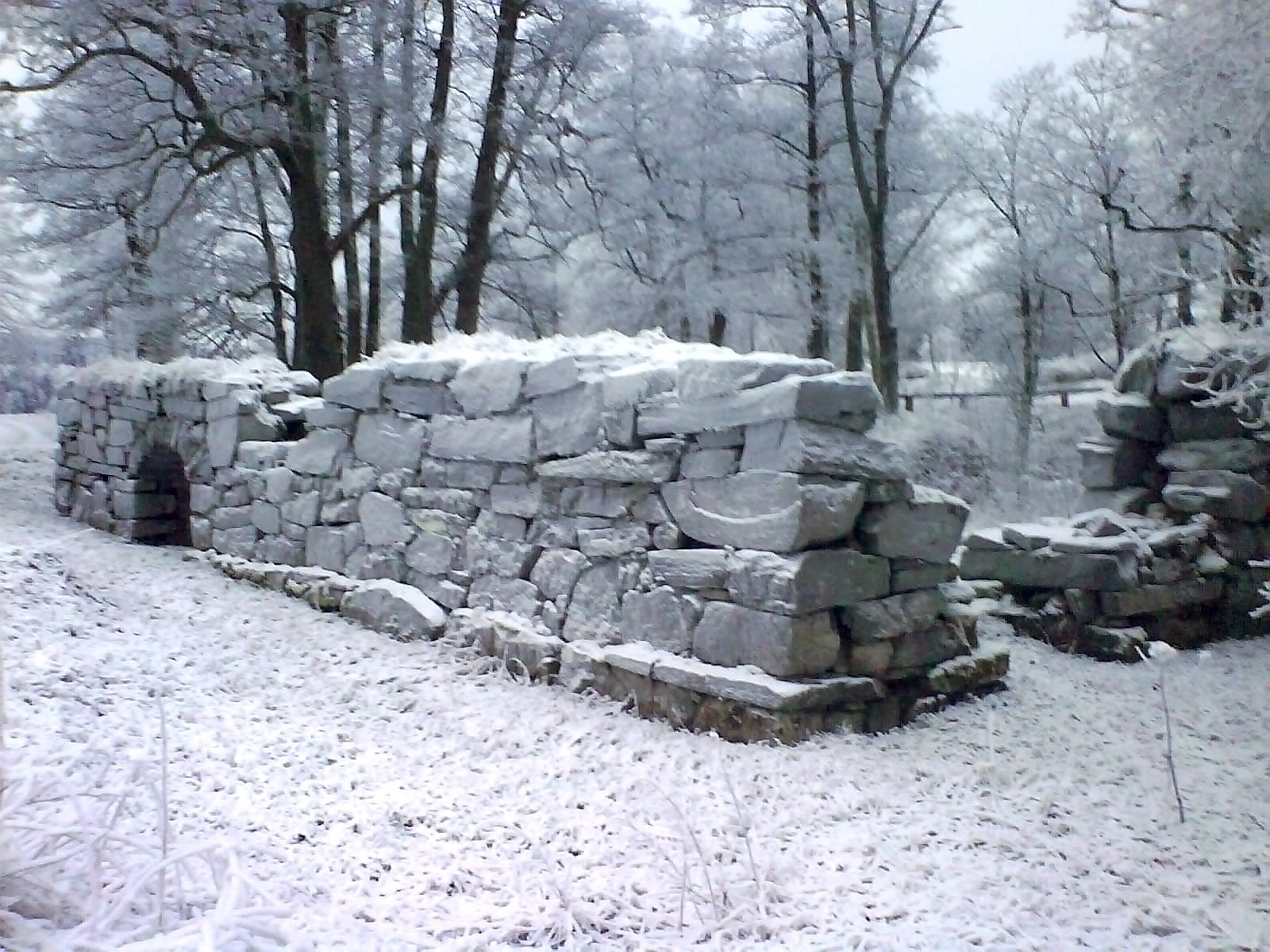 BIld av Ackkärrs smedjeruin